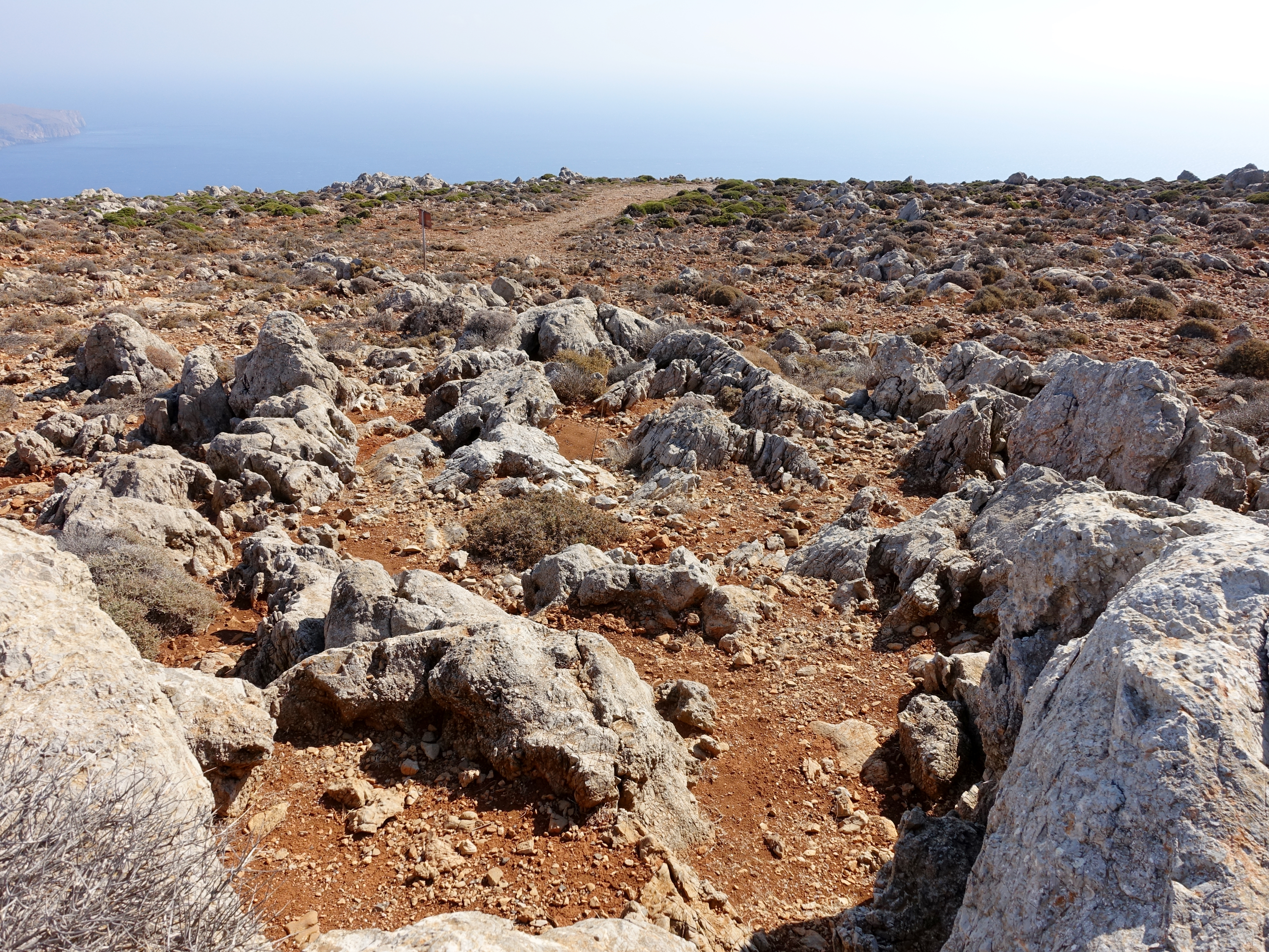 Lage des ehemaligen minoischen Gipfelheiligtums Traostalos, Gemeinde Sitia, Kreta, Griechenland